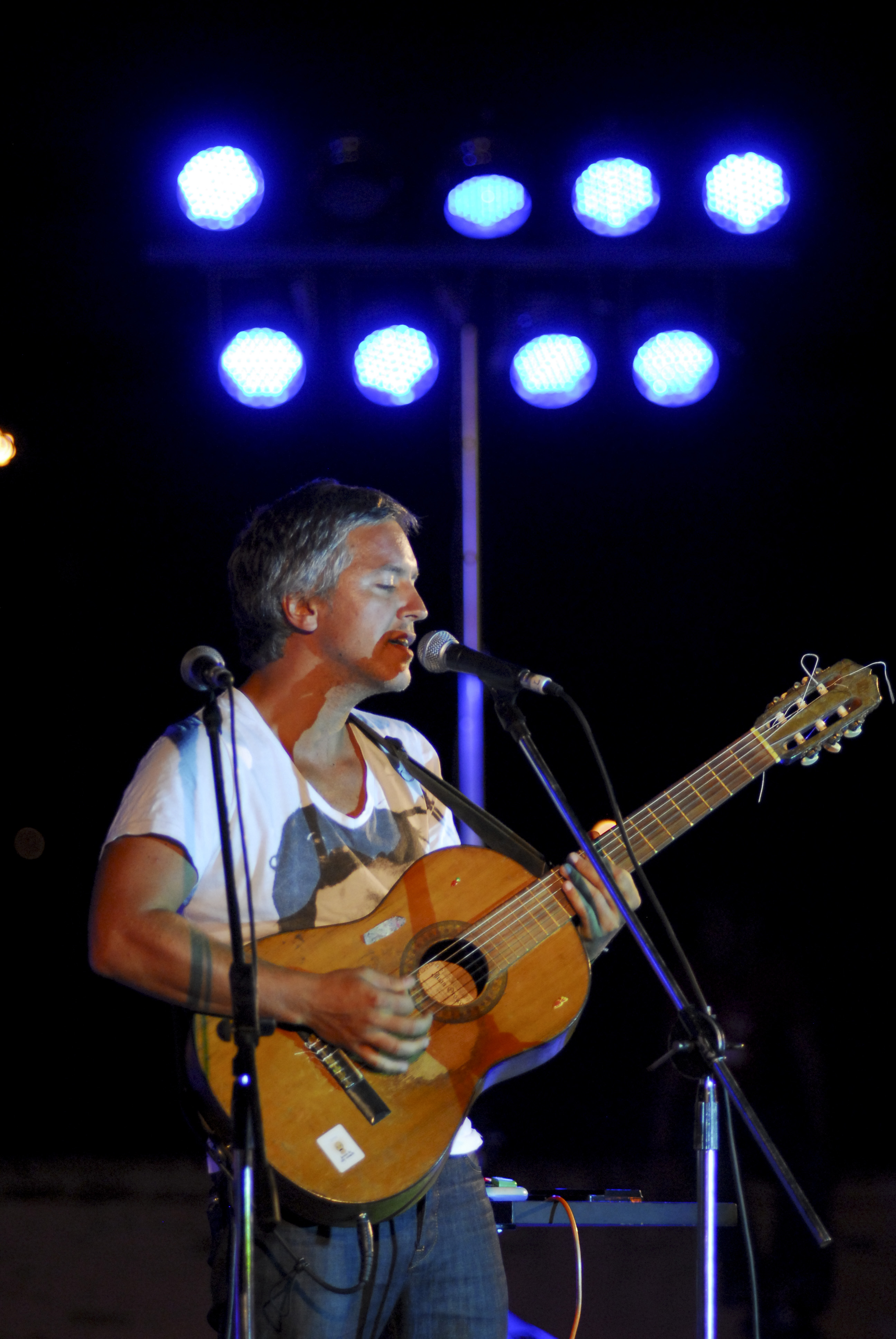 Martín Buscaglia